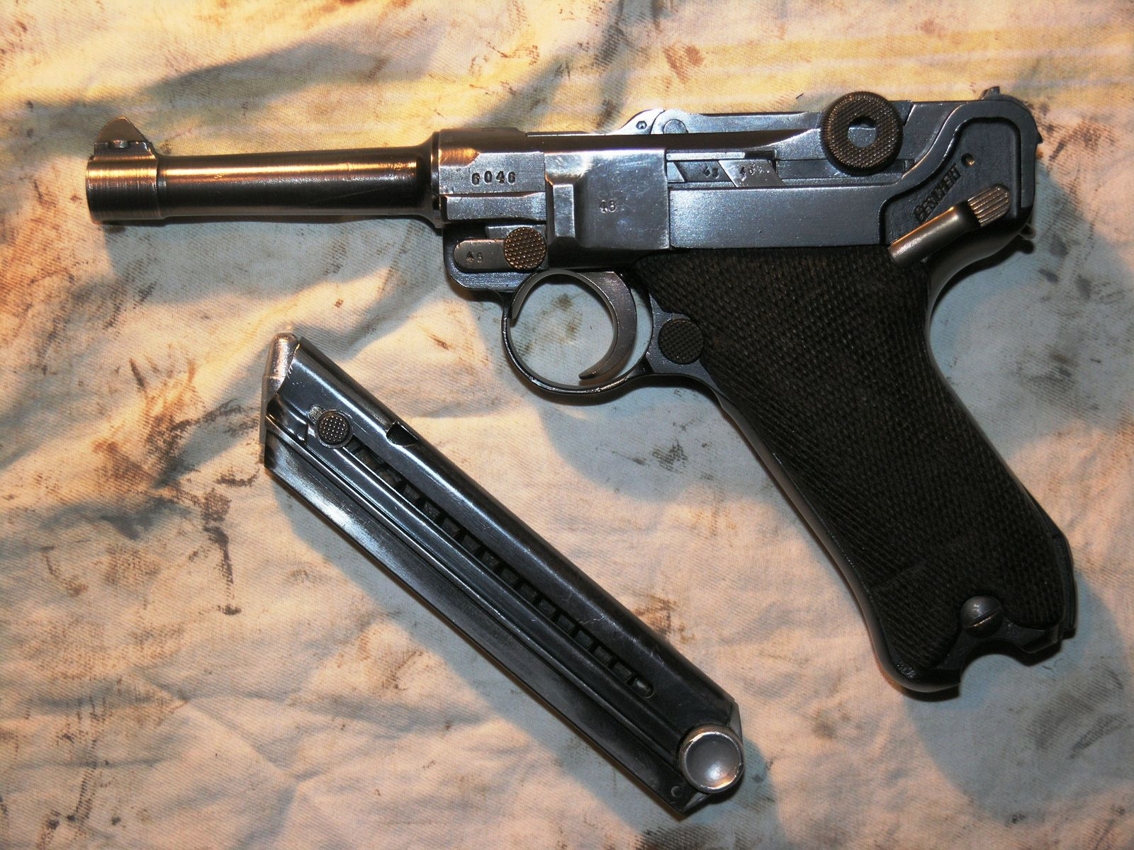 pistole luger